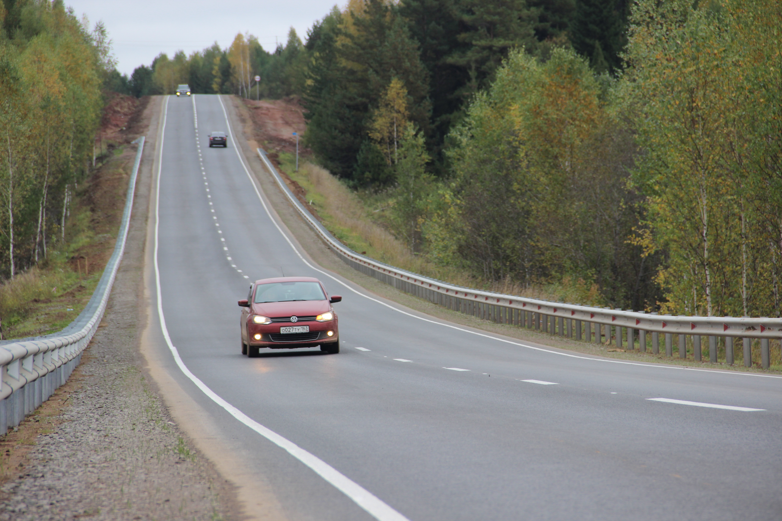 Участок автодороги Ижевск — Воткинск, граница Пермского края